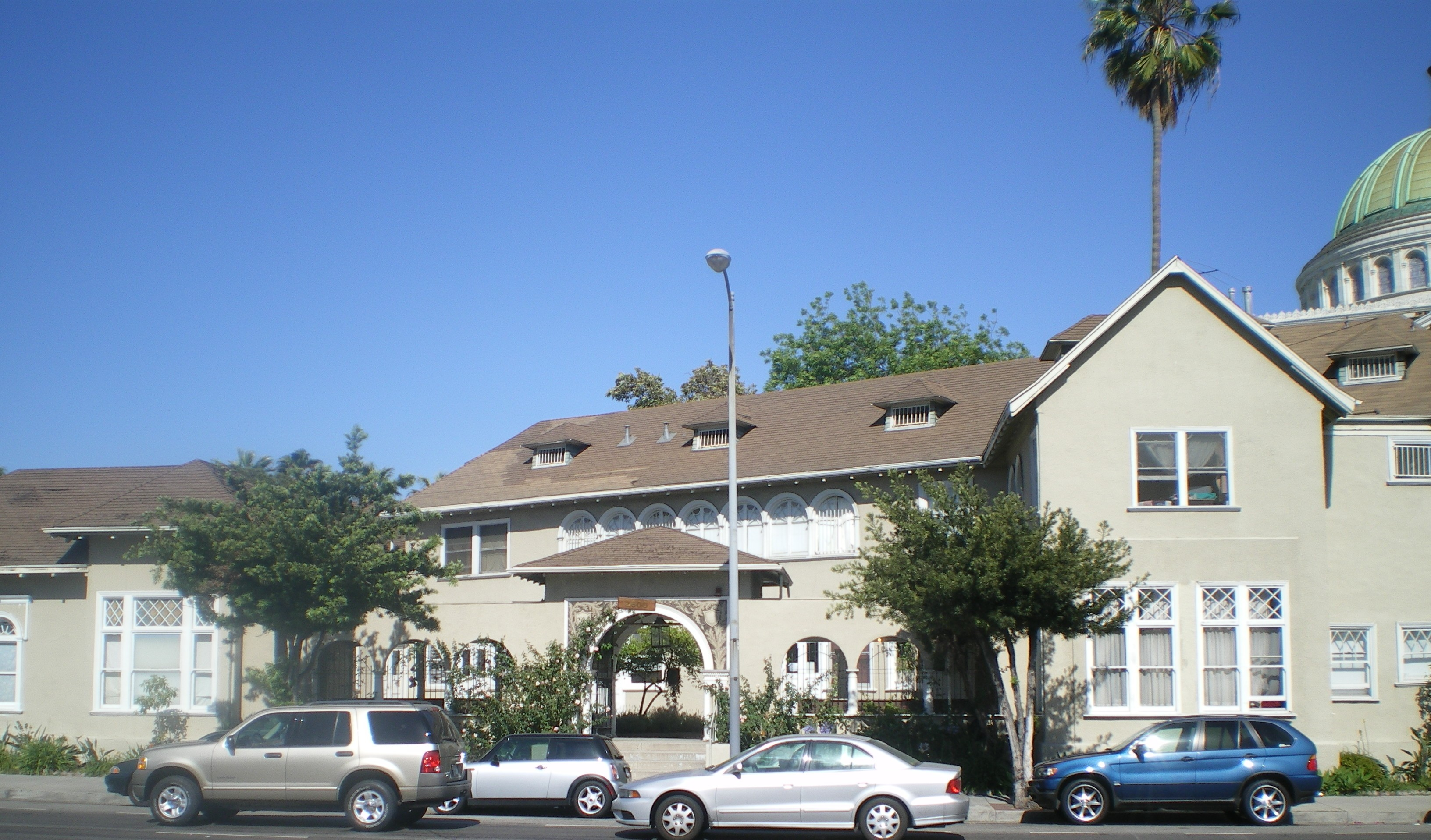 Casa de Rosas, 2600 S. Hoover St., Los Angeles, California